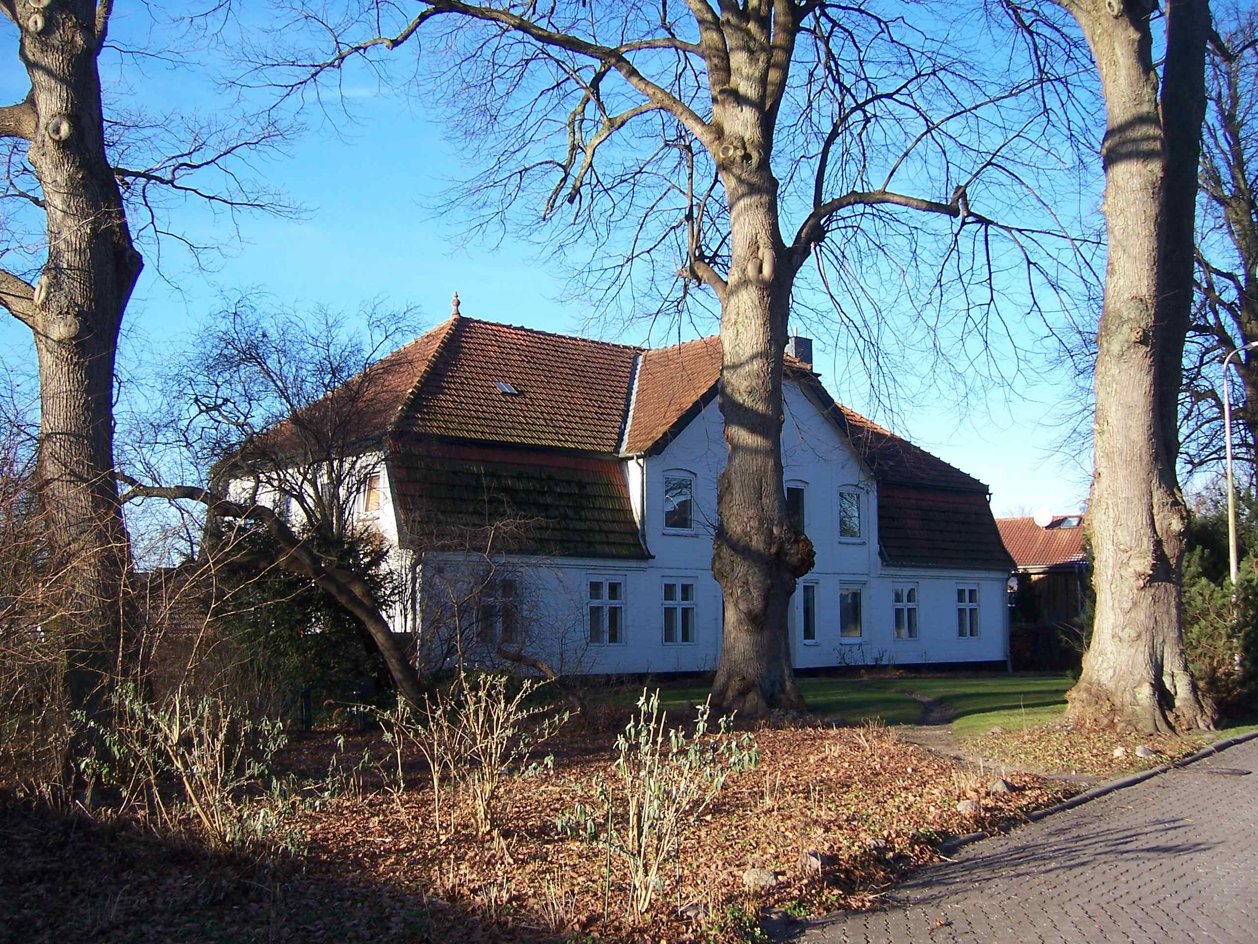 ehemaliges Gutshaus Wilhelmsthal